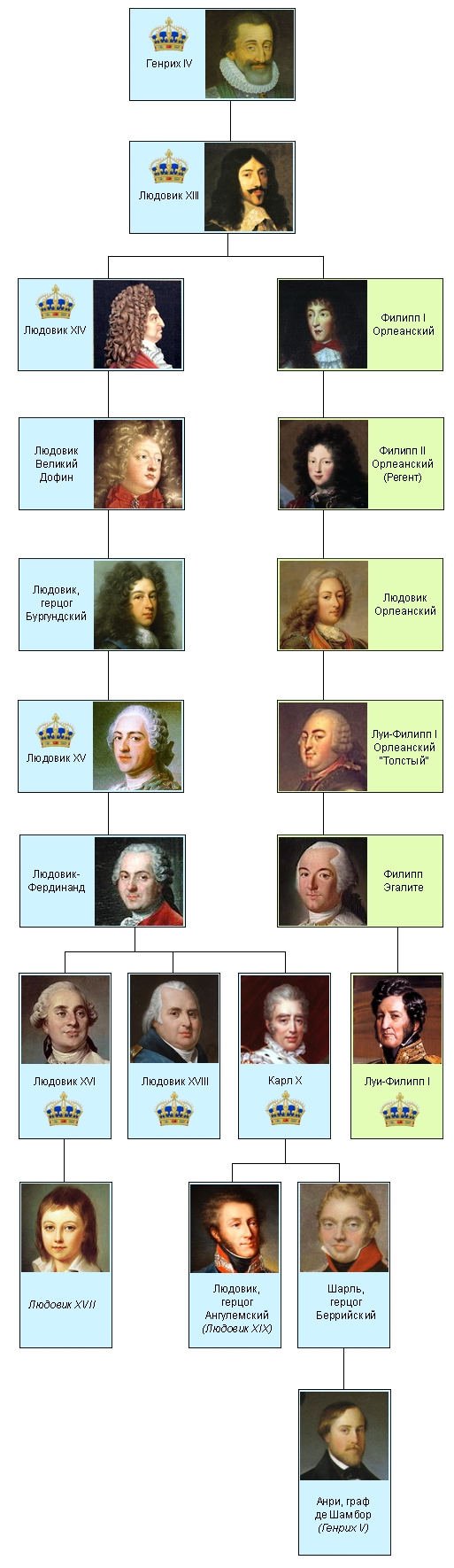 Династия французских королей из рода Бурбонов